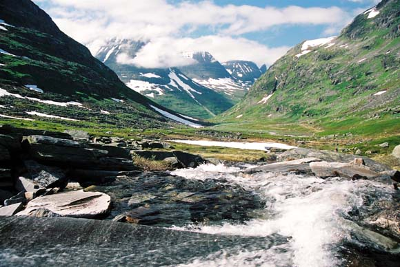 Innerdalen. Innerdalstårnet i syningom.